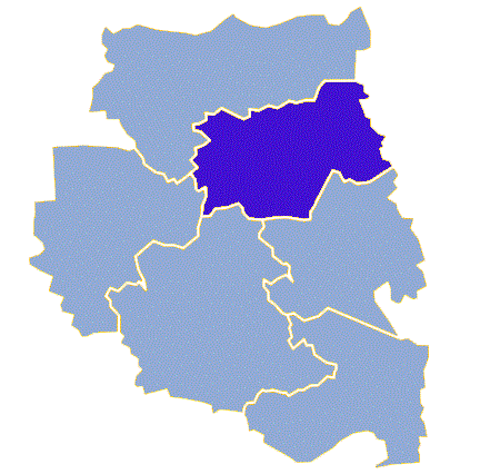 Powiat międzyrzecki, gmina Przytoczna